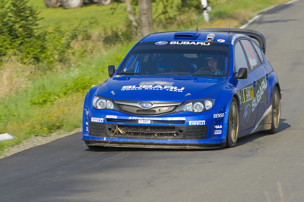 Chris Atkinson driving his Subaru Impreza WRC2008 at the 2008 Rallye Deutschland.